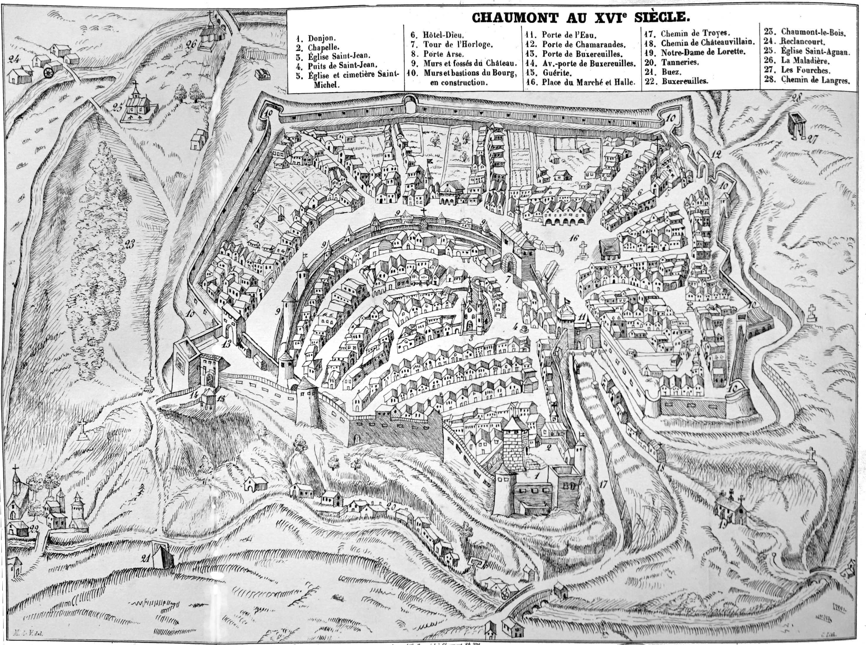 le chateau et la ville de Chaumont d'après la La Cosmographie universelle de tout le monde de François d eBelleforest.